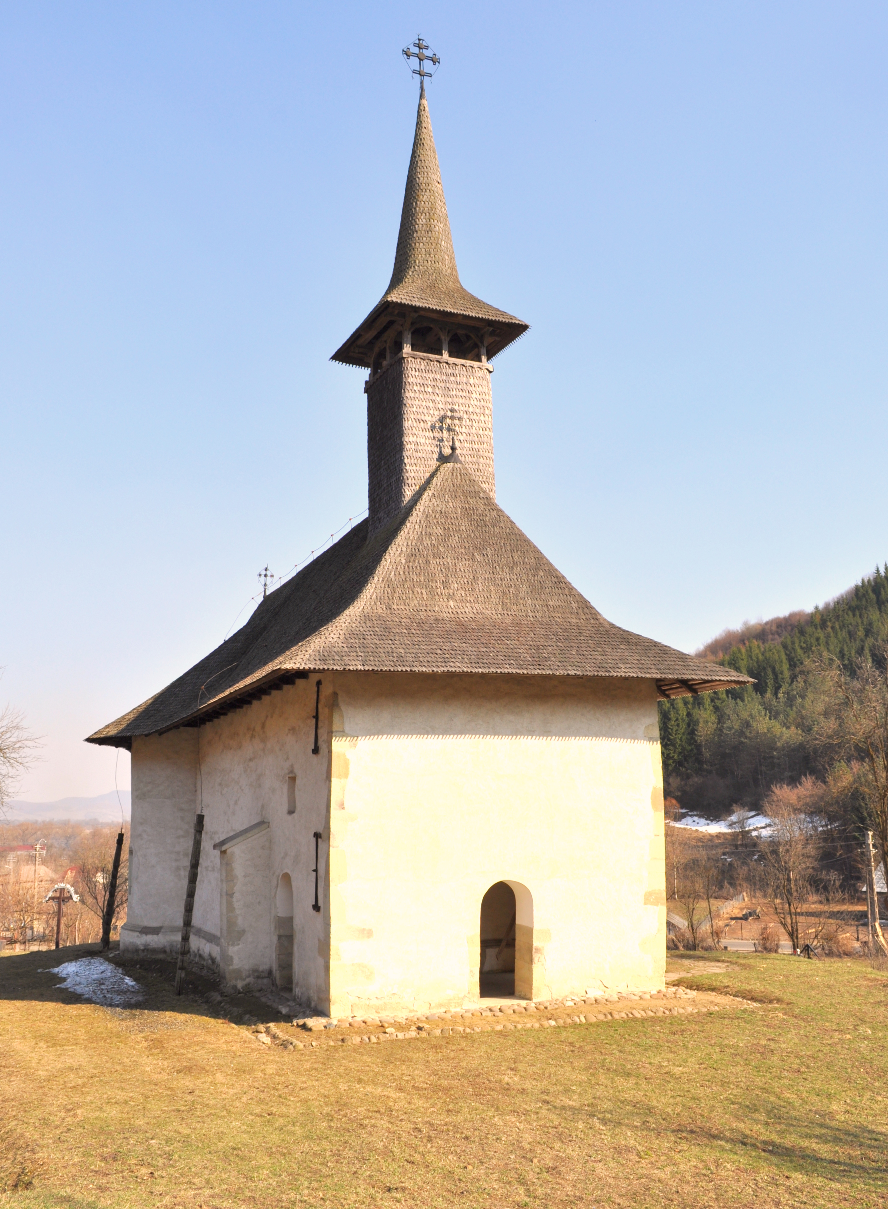 Biserica "Adormirea Maicii Domnului" a mănăstirii Vadului , sat Vad, județul Cluj